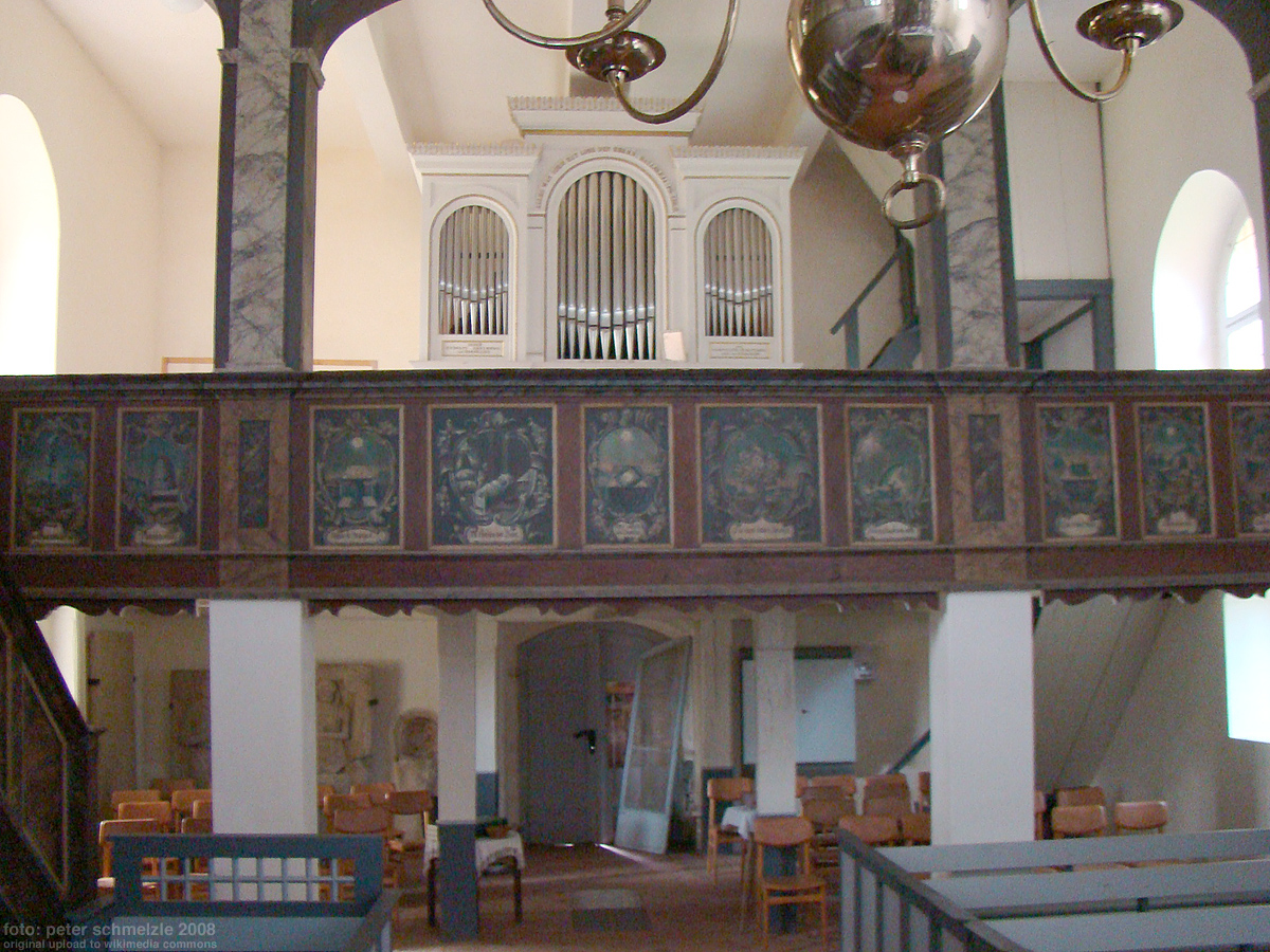 Dorfkirche in Kummerow am See, Orgelempore